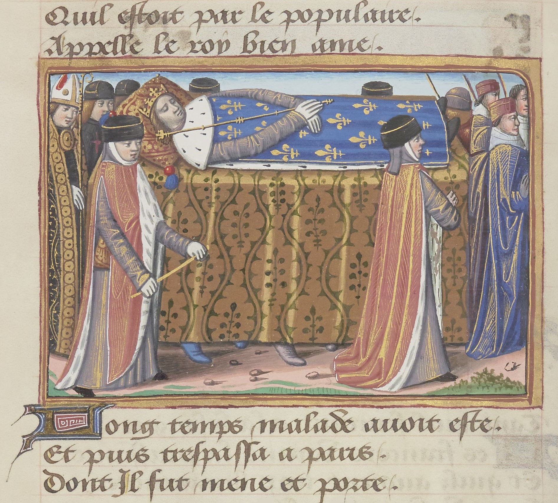 Funérailles du roi Charles VI. Enluminure du manuscrit de Martial d'Auvergne, Les Vigiles de Charles VII, vers 1484, BnF, Manuscrit Français 5054, folio 27 verso.